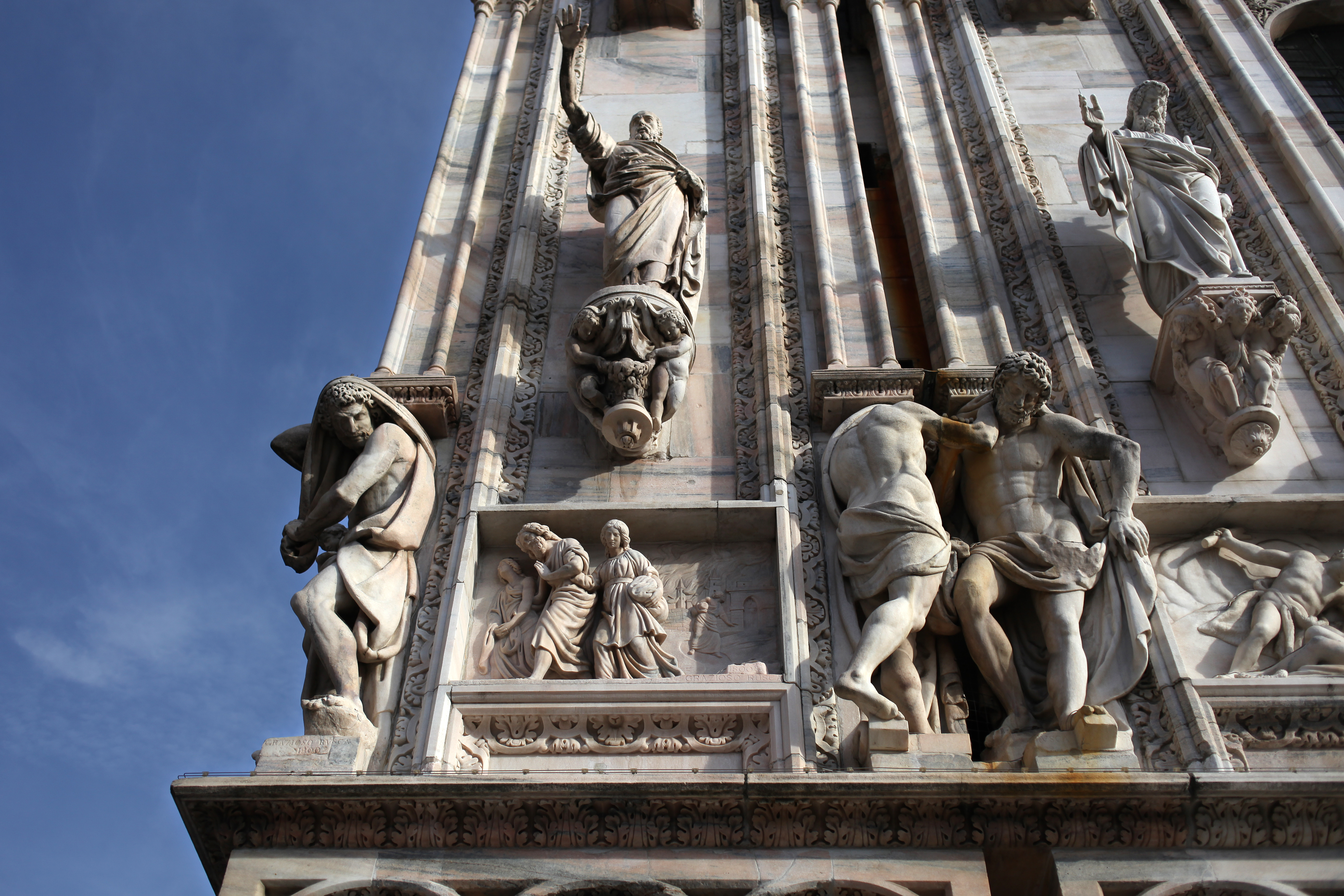 Grazioso Rusca (1757-1829) tre gruppi scultorei sulla facciata del Duomo di Milano (1800-1803)